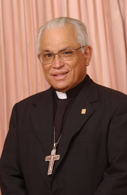 Mons. Barrantes